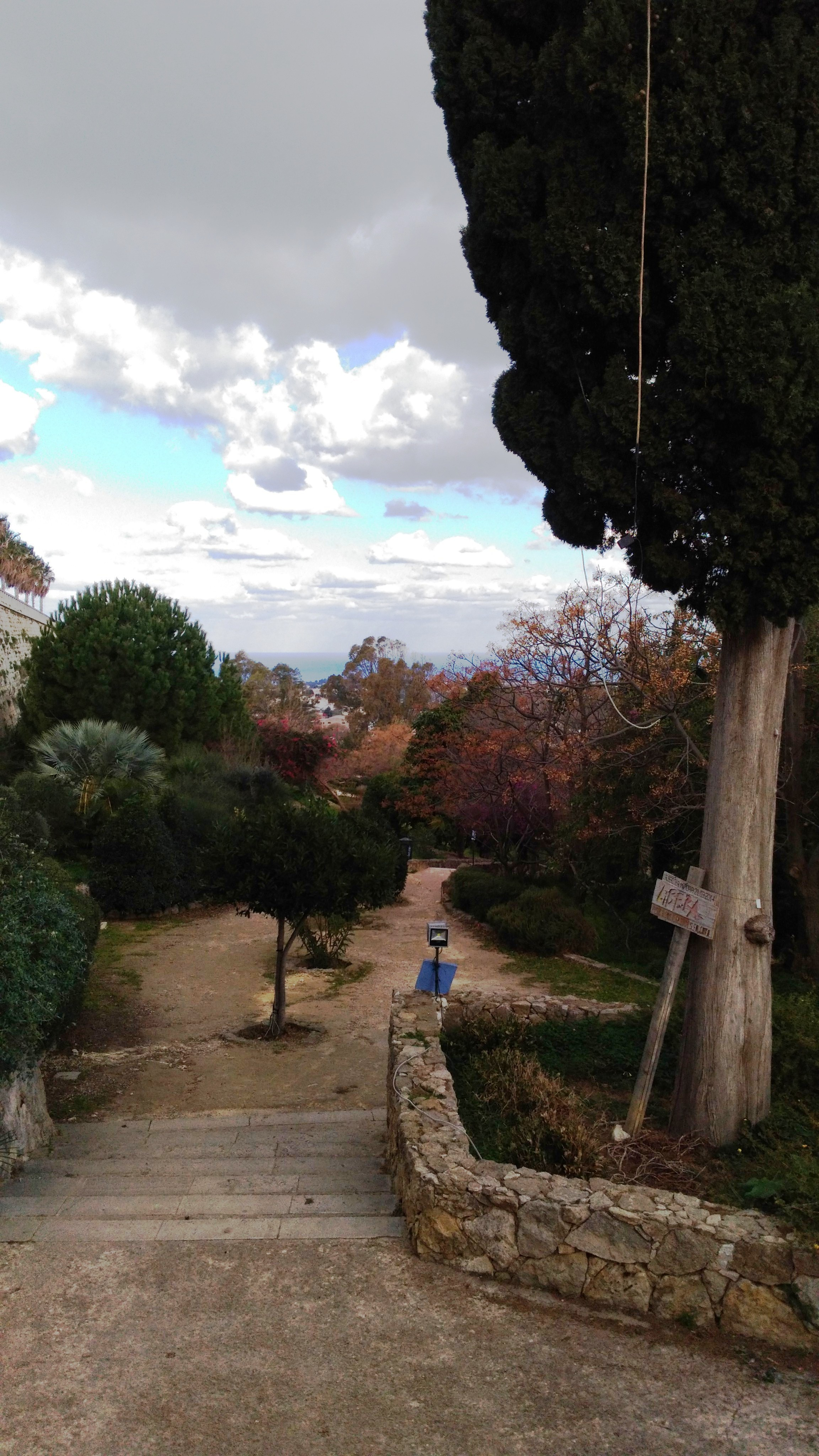 Entrata Parco Suburbano